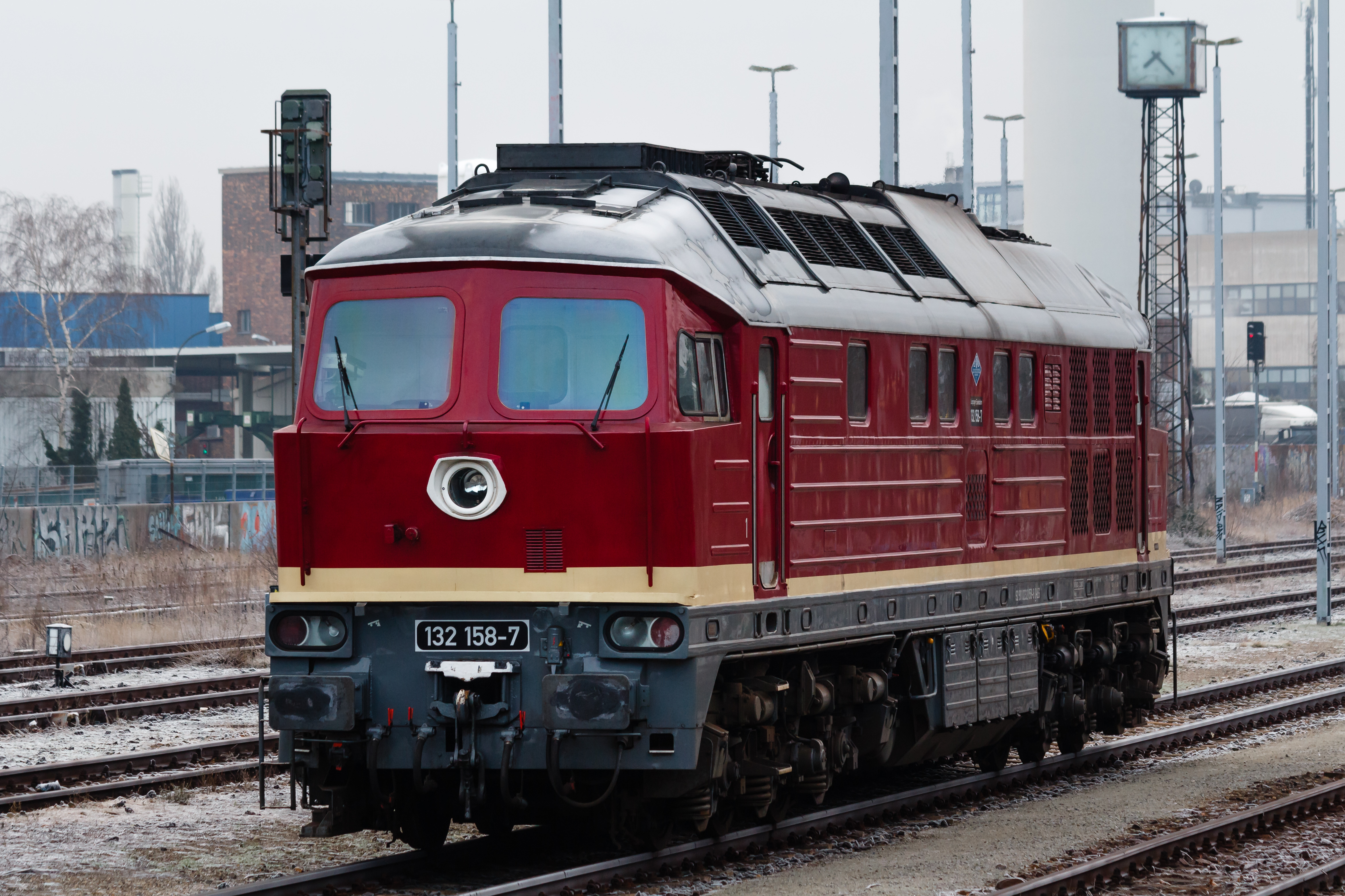 Diesellokomotive 132 158 im Bahnhof Marienfelde